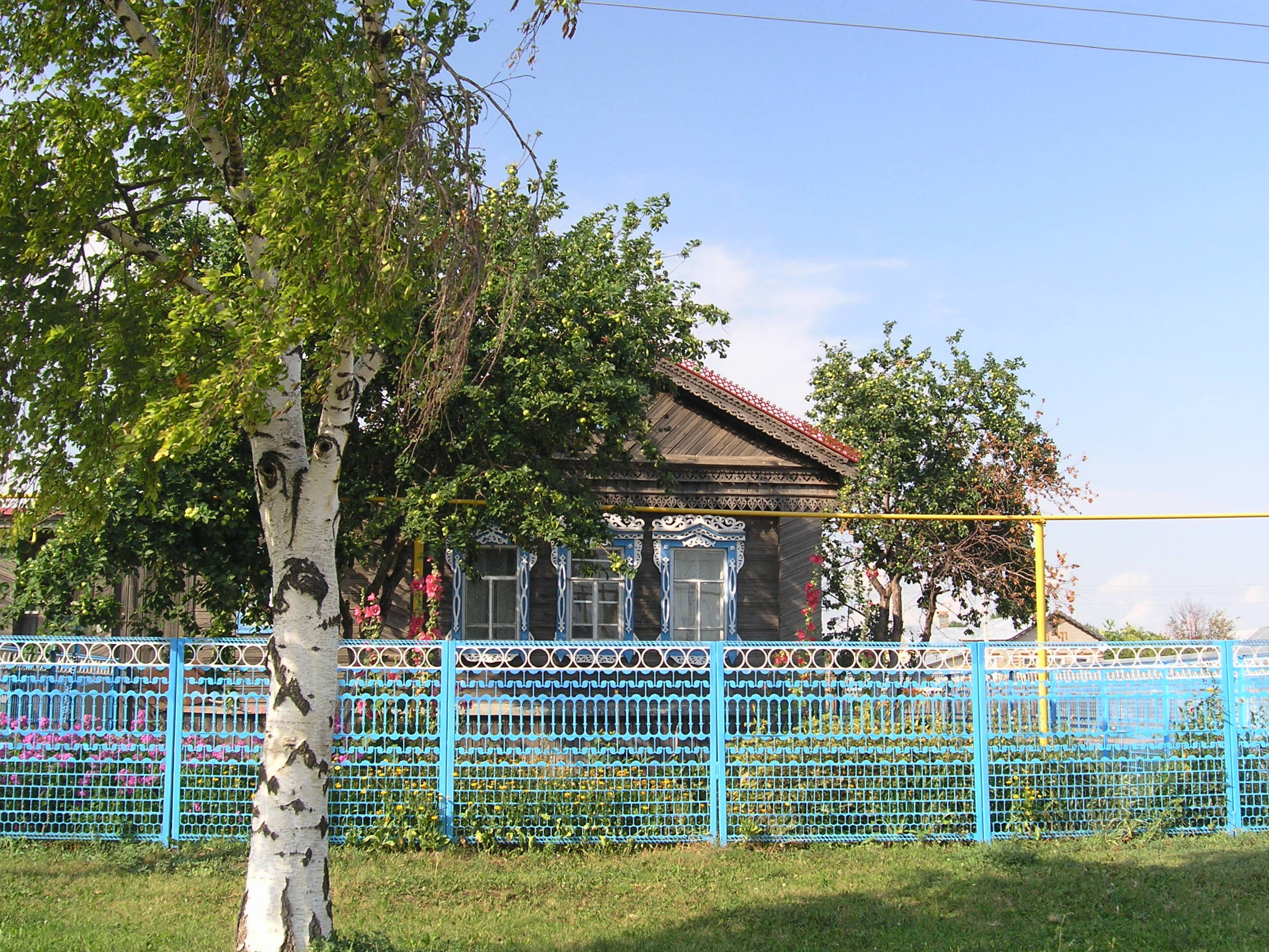 Жилой дом в селе Выселки, Ставропольский район Самарской области, Россия